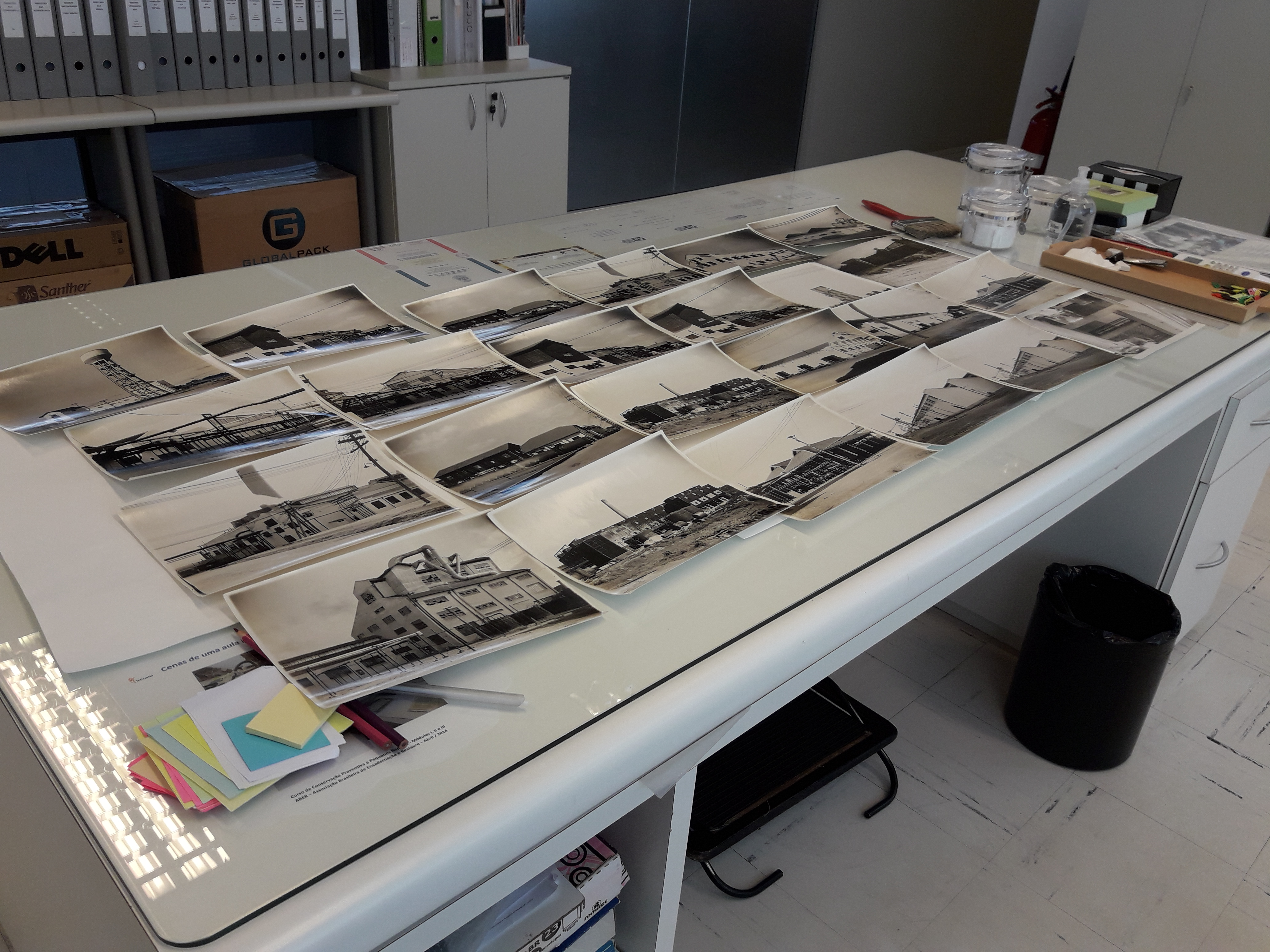 Imagens reconstruídas